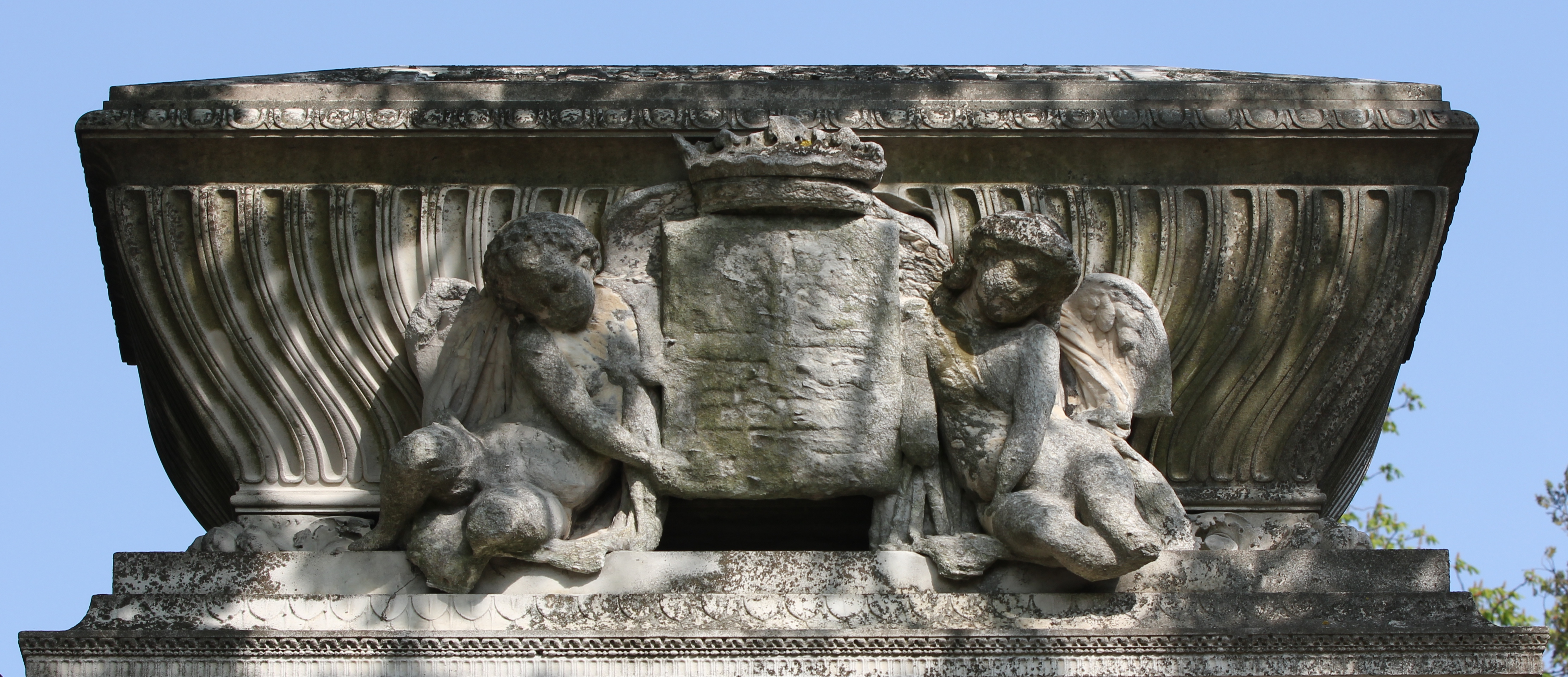 Monument surmonté de deux statues de femmes en marbre : à gauche, l'allégorie des arts représentée en jeune femme avec le torse à demi-nue tenant dans la main droite un maillet de sculpteur ; à droite, l'allégorie de la bienfaisance représentée en jeune femme drapée tenant dans la main droite un oiseau et des épis de blé dans la main gauche. Le tombeau est décoré de génies sculptés en relief.